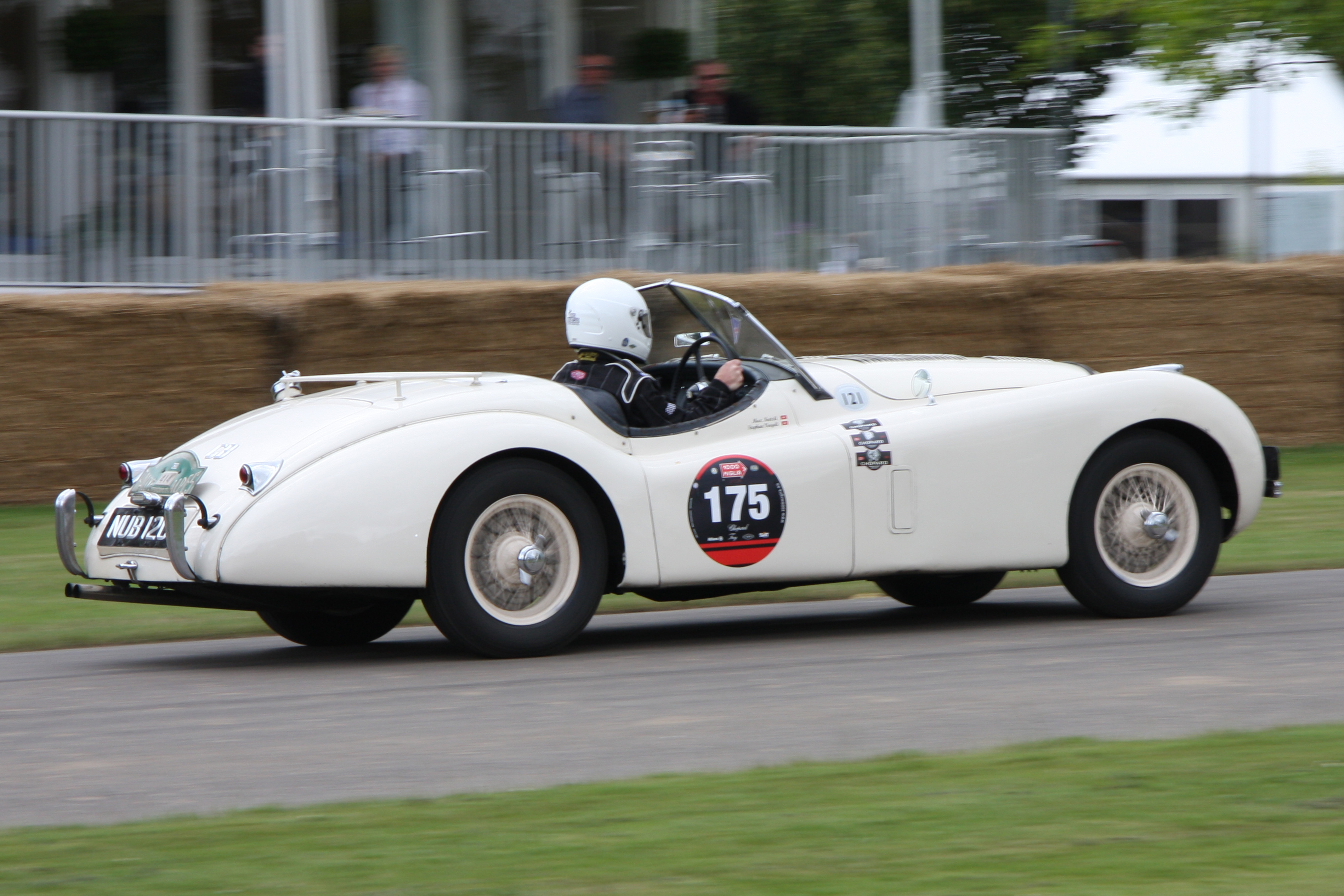 Built 1950. 3.4 litre 6 cylinder